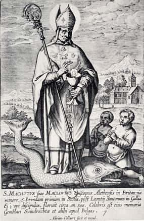 Святой Мало Католический святой, основатель Бретани